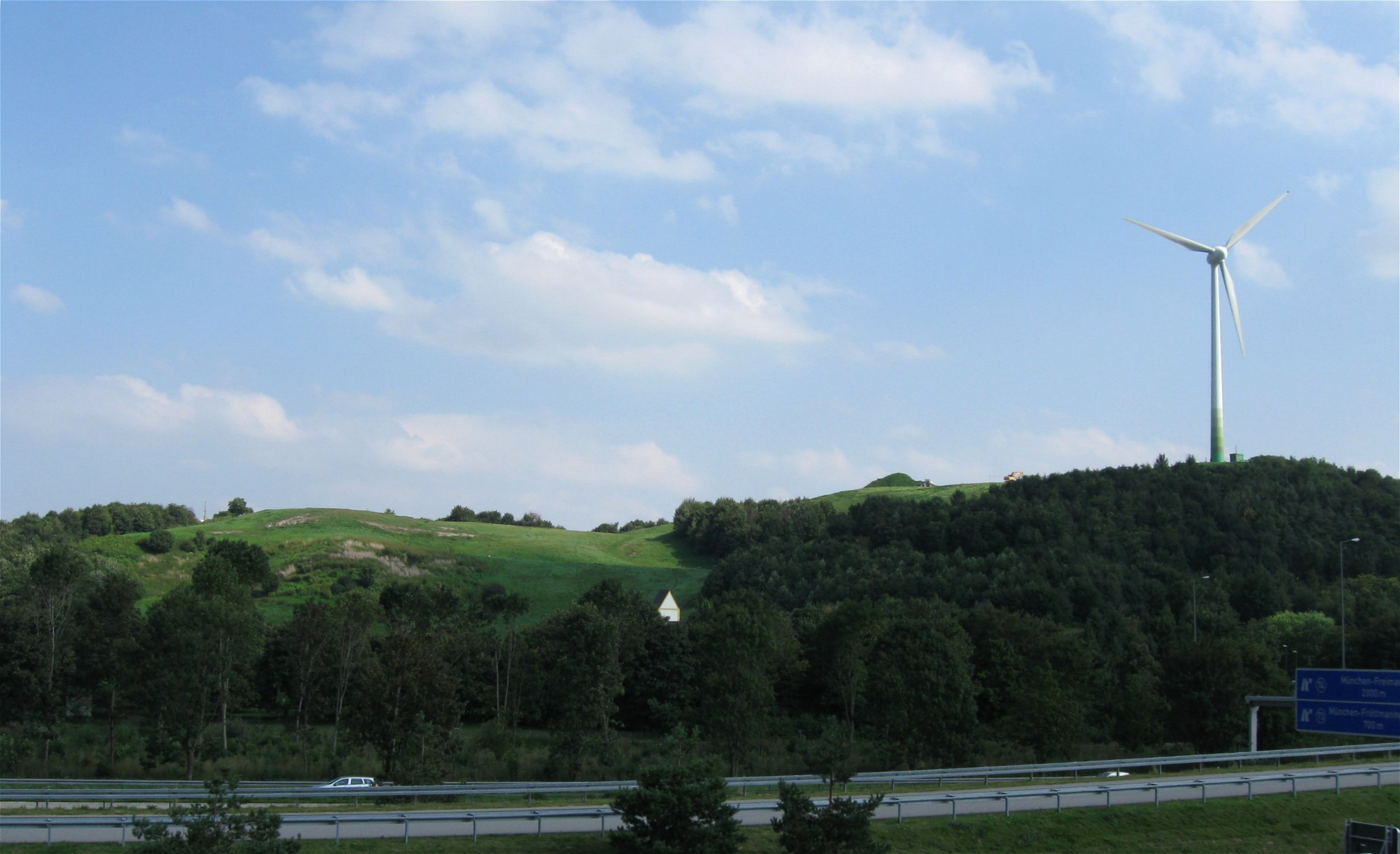 Fröttmaninger Berg, München, mit Windkraftanlage, Autobahn A9